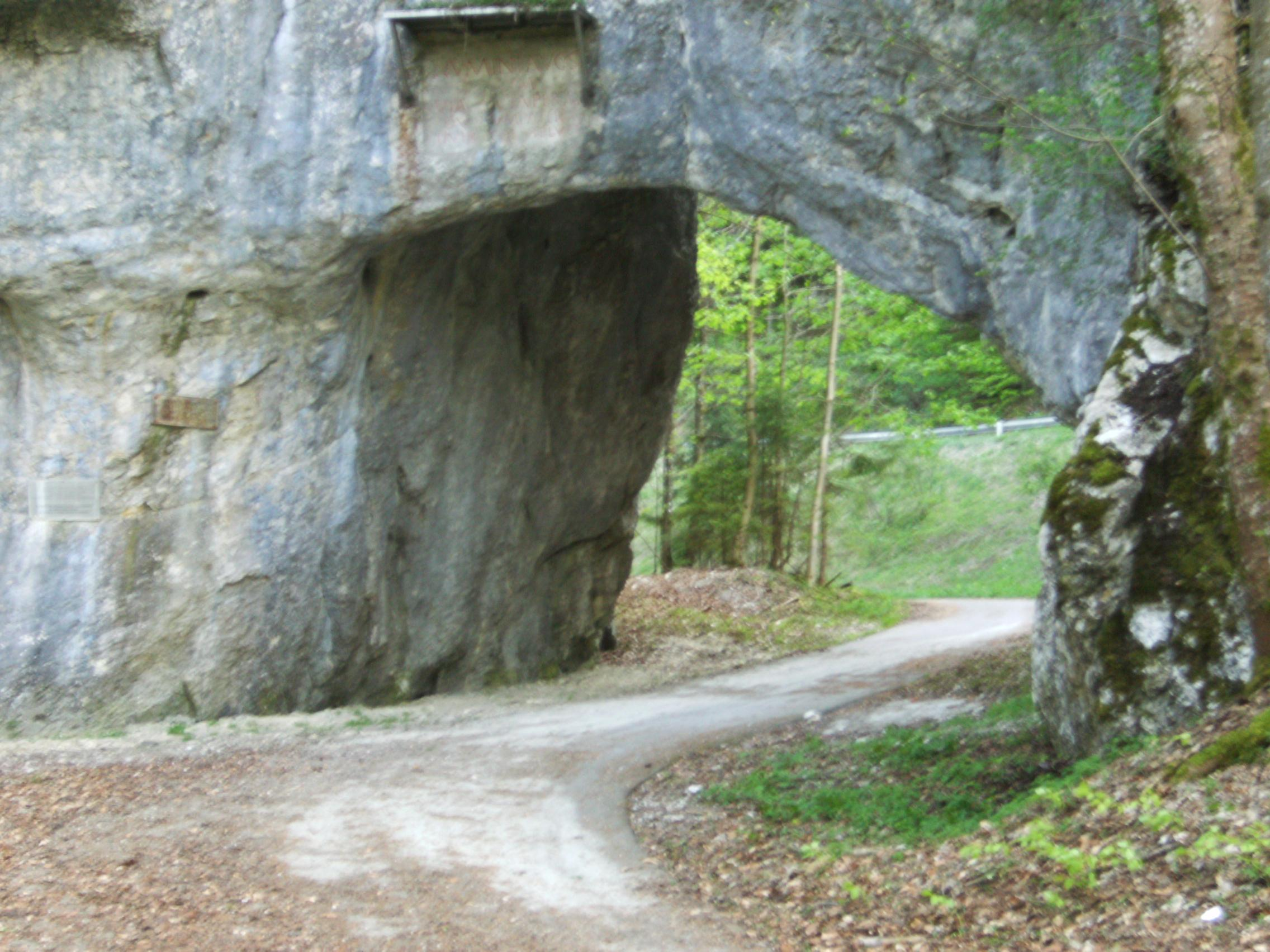 Col de Pierre Pertuis (Massif du Jura côté Suisse). Passage de l'ancienne voie par la pierre percée.